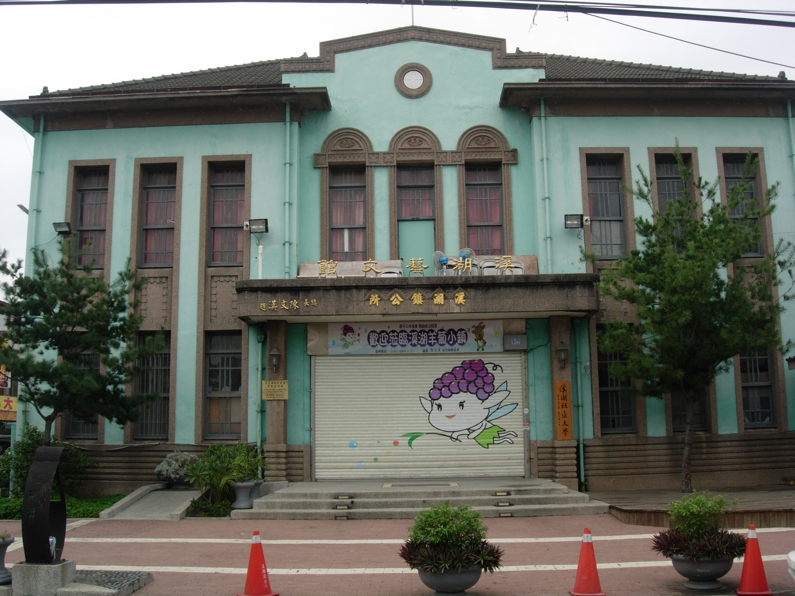 溪湖庄役場。中文（台灣）: 溪湖庄役場。